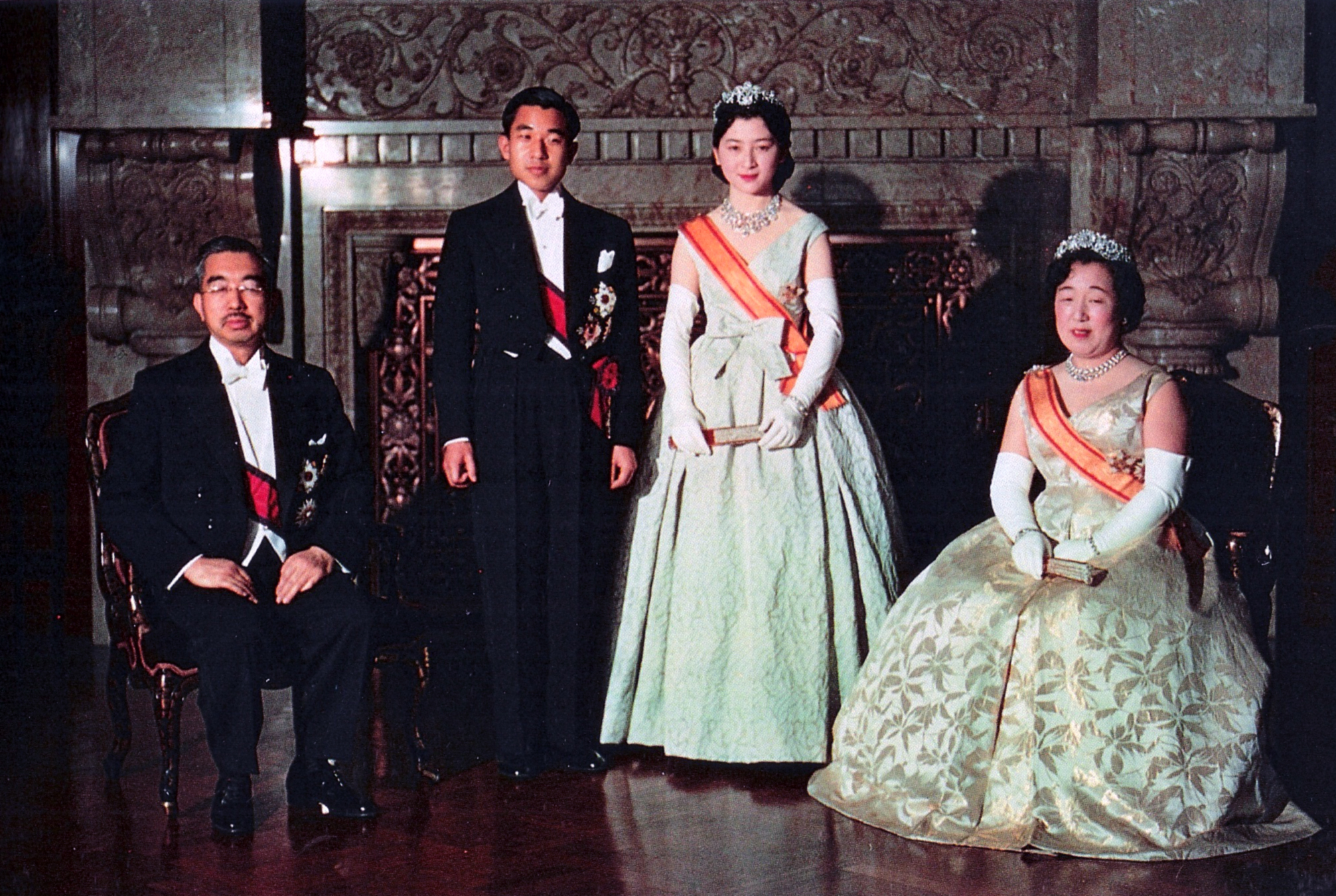 朝見の儀を終えた、皇太子明仁親王と皇太子妃美智子、および昭和天皇・香淳皇后